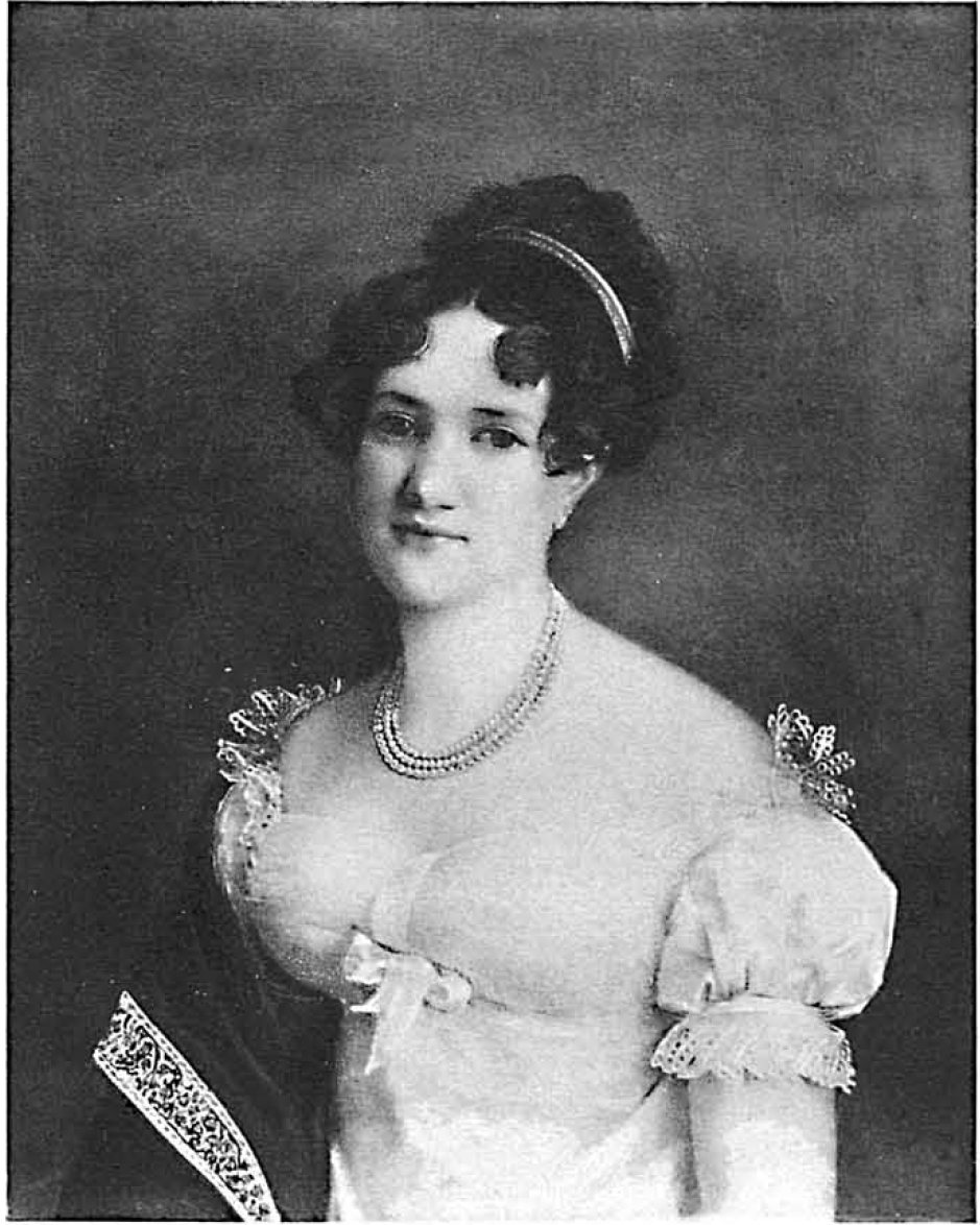 Прасковья Михайловна Муравьёва (1788-1835)